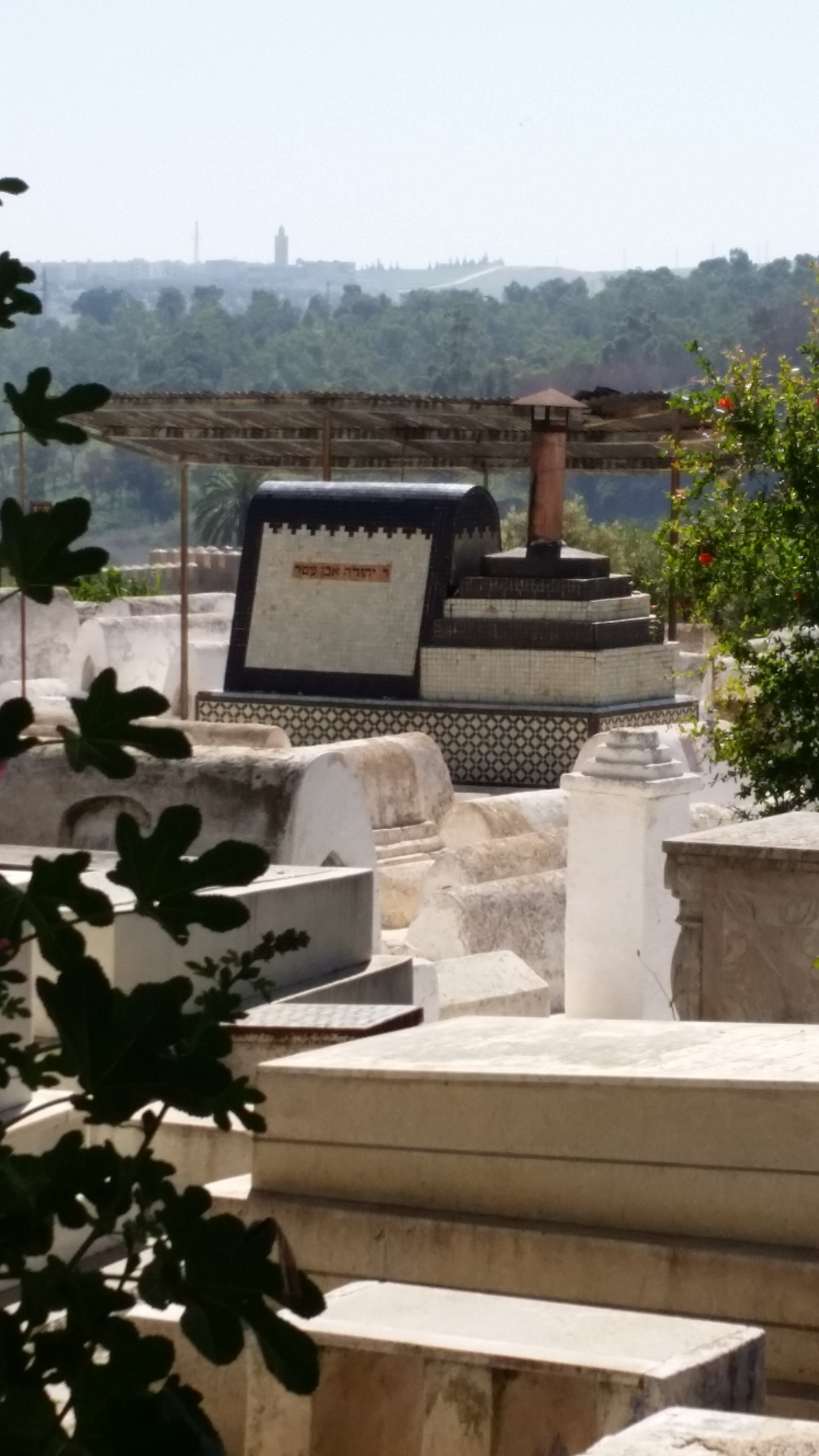 קברו של רבי יהודה בן עטר בעיר פאס